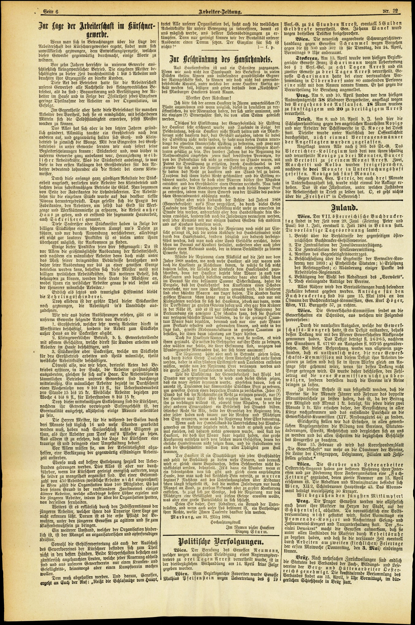 Arbeiter-Zeitung. Organ der österreichischen Sozialdemokratie. Ausgabe vom 20. April 1894, Nr. 32, S. 6. Zur Lage der Lage der Arbeiterschaft im Kürschnergewerbe. Zur Beschränkung des Hausirhandels. Politische Verfolgungen.